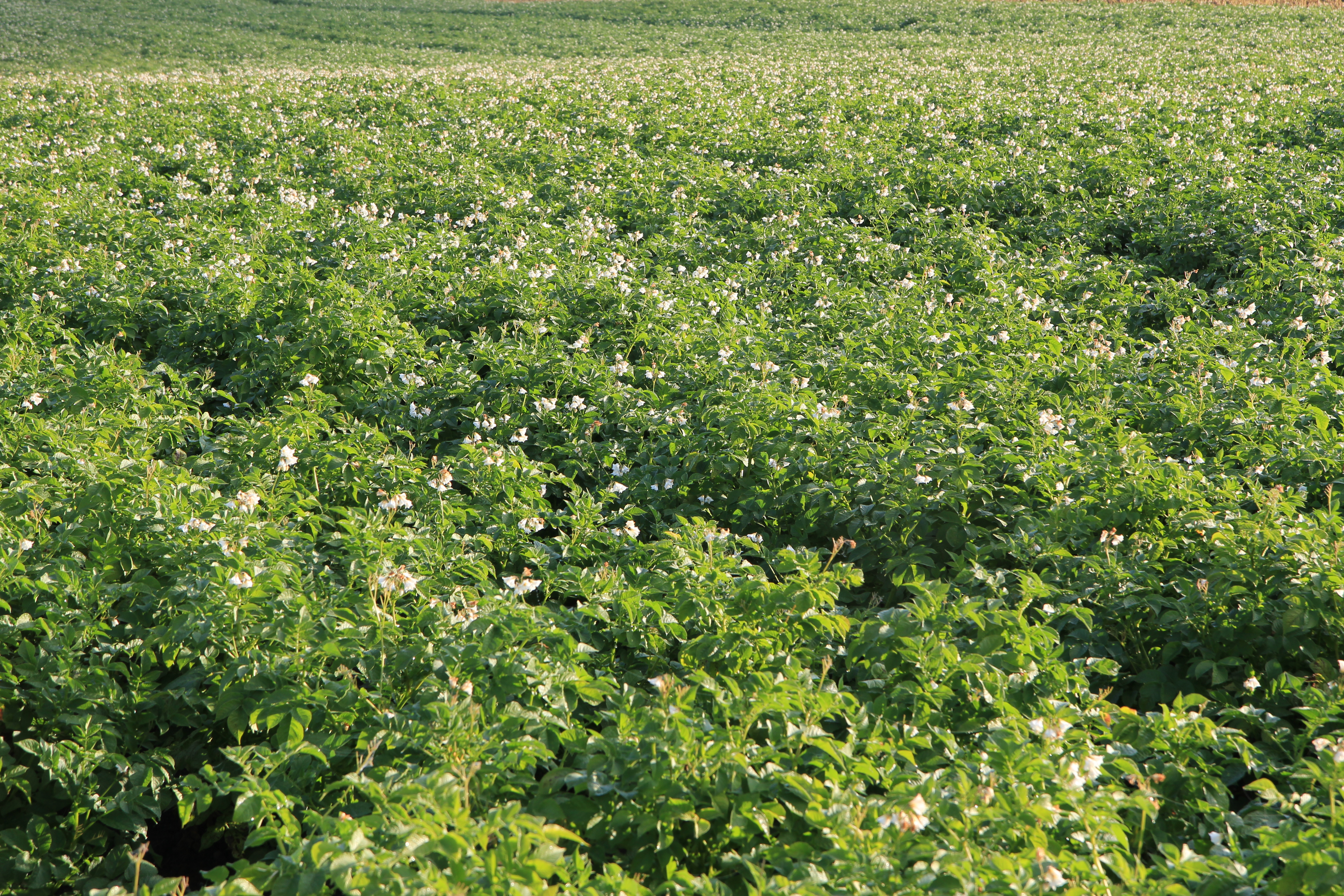 Potetåker blomstrer.